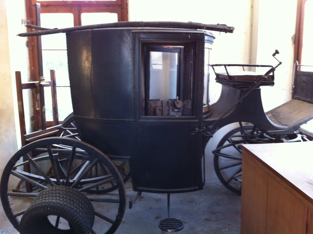 Carrozza utilizzata durante le riprese del film "Senso" diretto da Luchino Visconti. Custodita tutt'oggi in Villa Godi Malinverni, Lugo di Vicenza